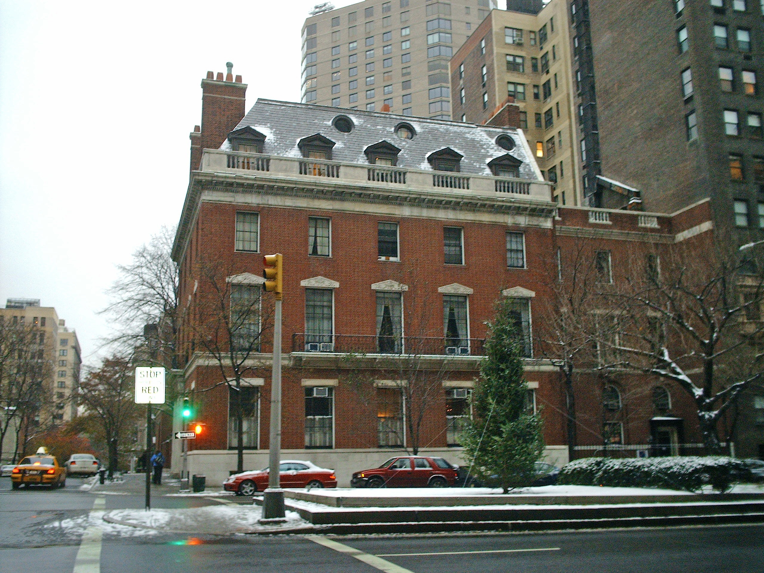 Синодальный Знаменский собор на Манхэттене